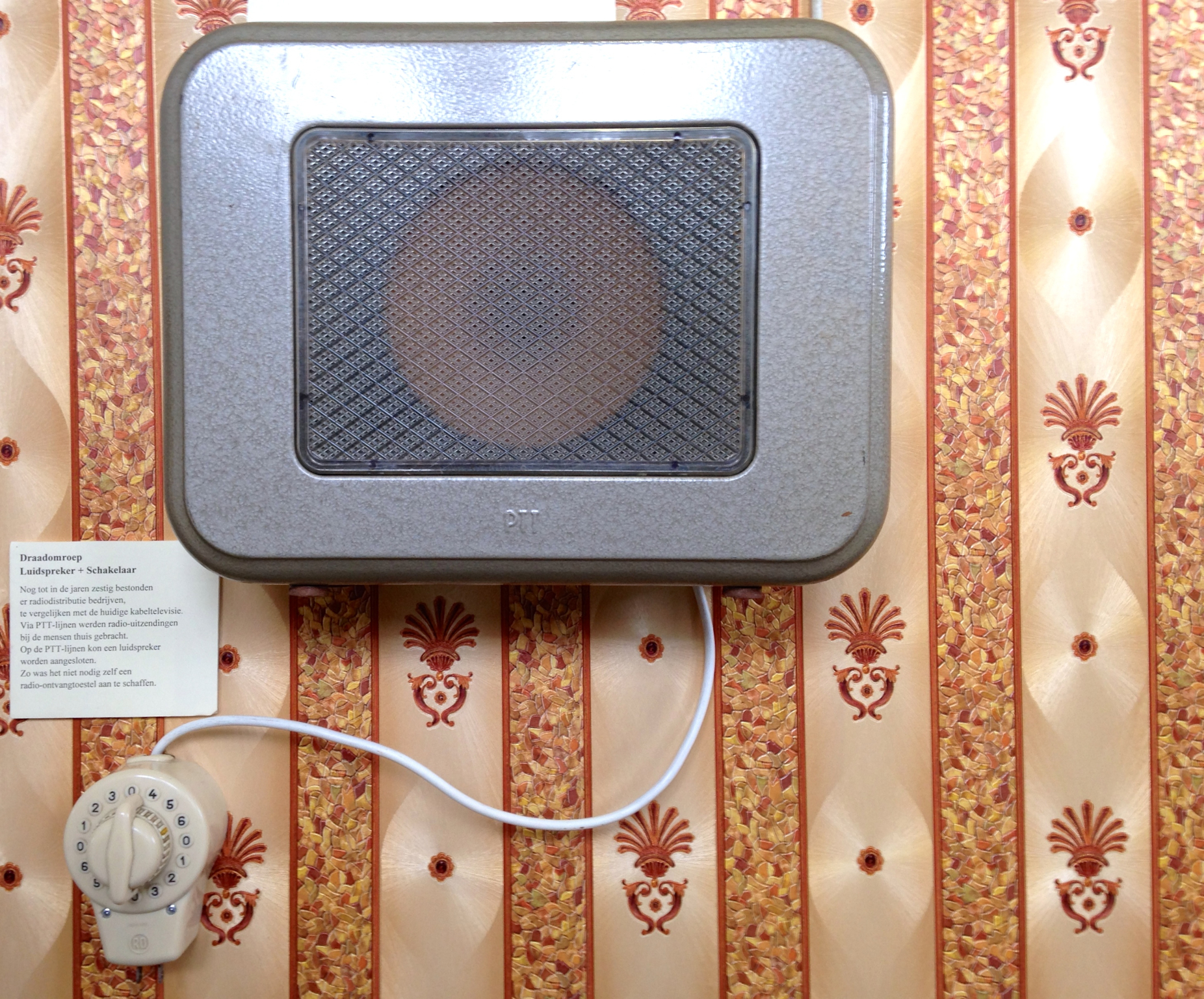 Draadomroep jaren 50 met Nedap keuzeschakelaar.